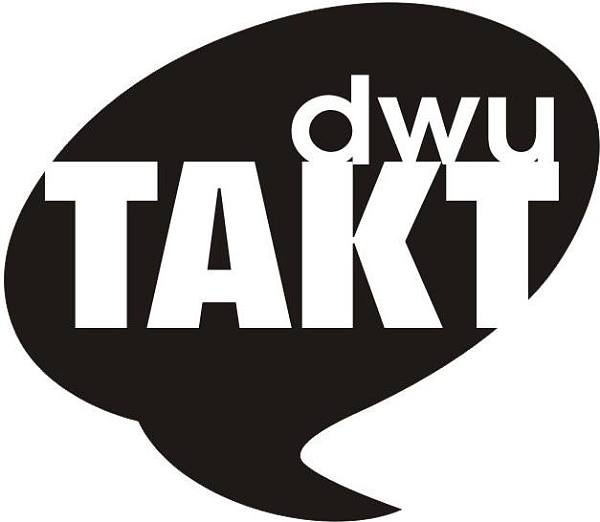 Logo festiwalu DwuTakt